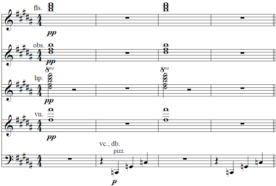 Final poèma simfònic, acord de tònica.